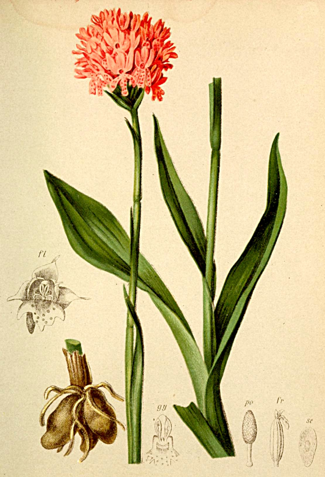 Orchis globosa (Traunsteinera globosa)